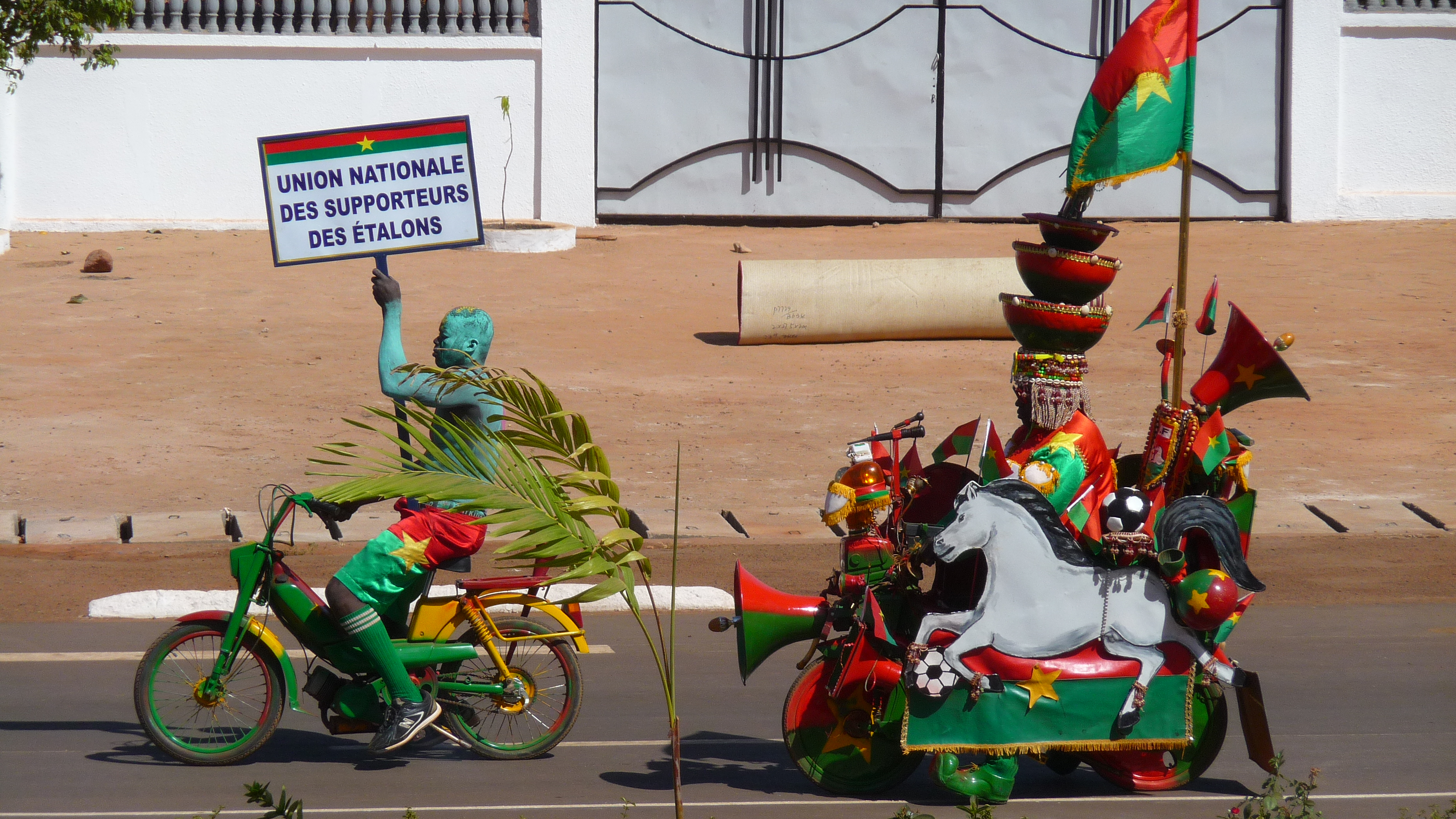 Les étalons sont le nom de l'équipe nationale de foot et leurs supporteurs les suivent avec créativité et zèle ! This is an image with the theme "Africa on the Move or Transport" from: Burkina Faso